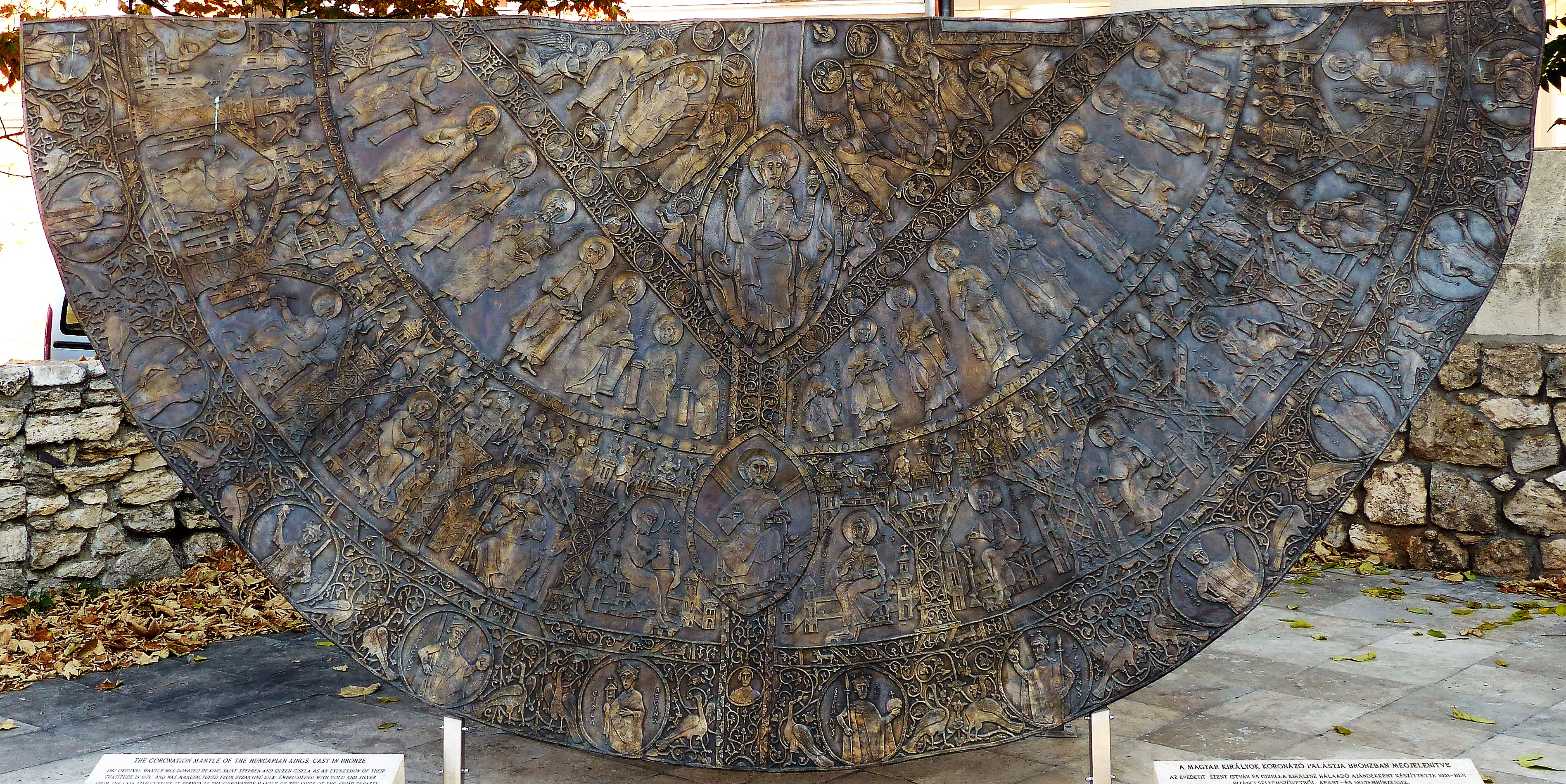 Koronázási Palást. A felvétel 2017. október 17-én, kedden készült a Mária Magdolna-templom mellett, a Várban, Budapesten. A Magyar Nemzeti Múzeumban látható eredeti palást bronzban, Rieger Tibor szobrász alkotása.